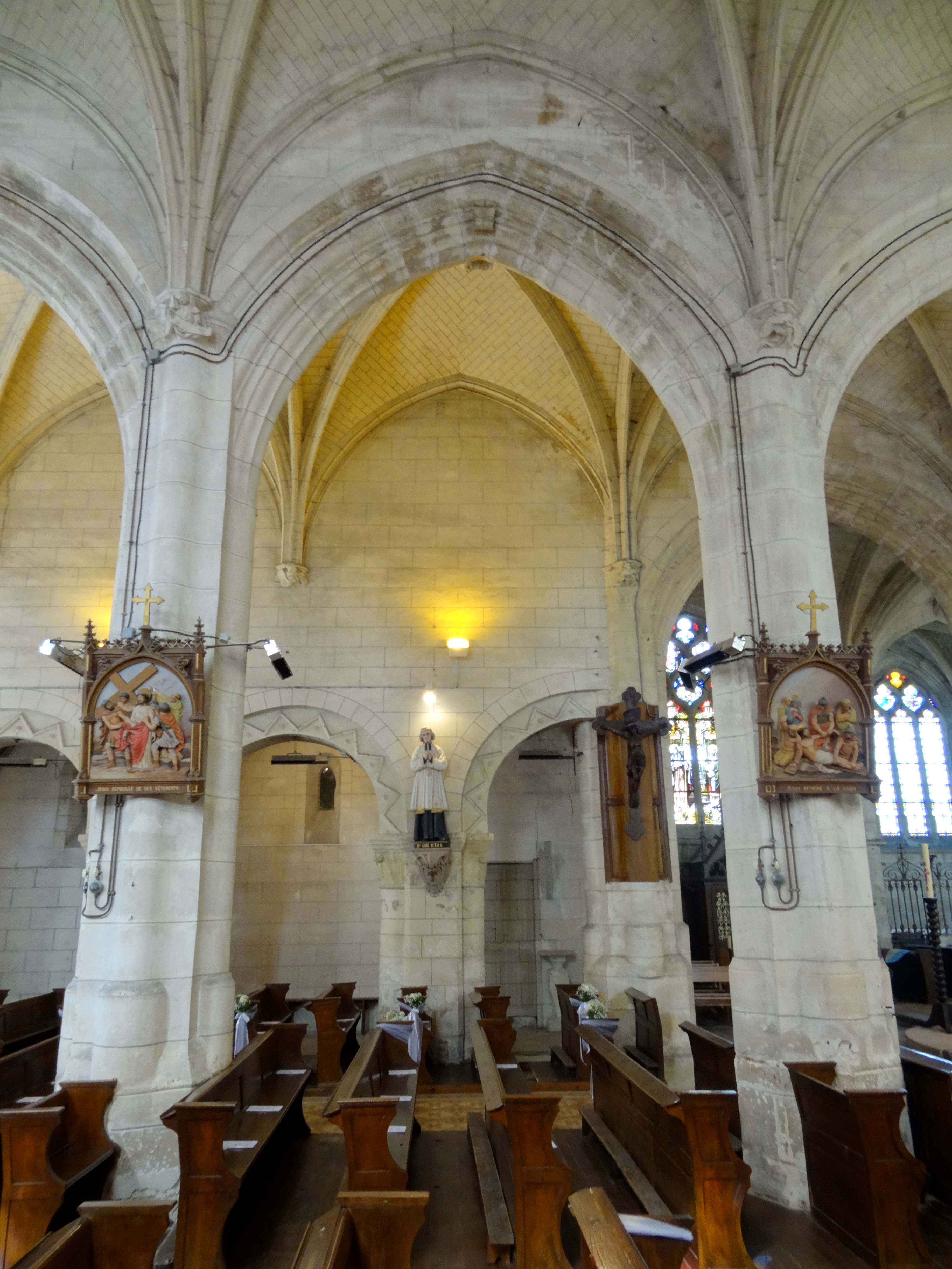 Intérieur de l'église - voir titre.